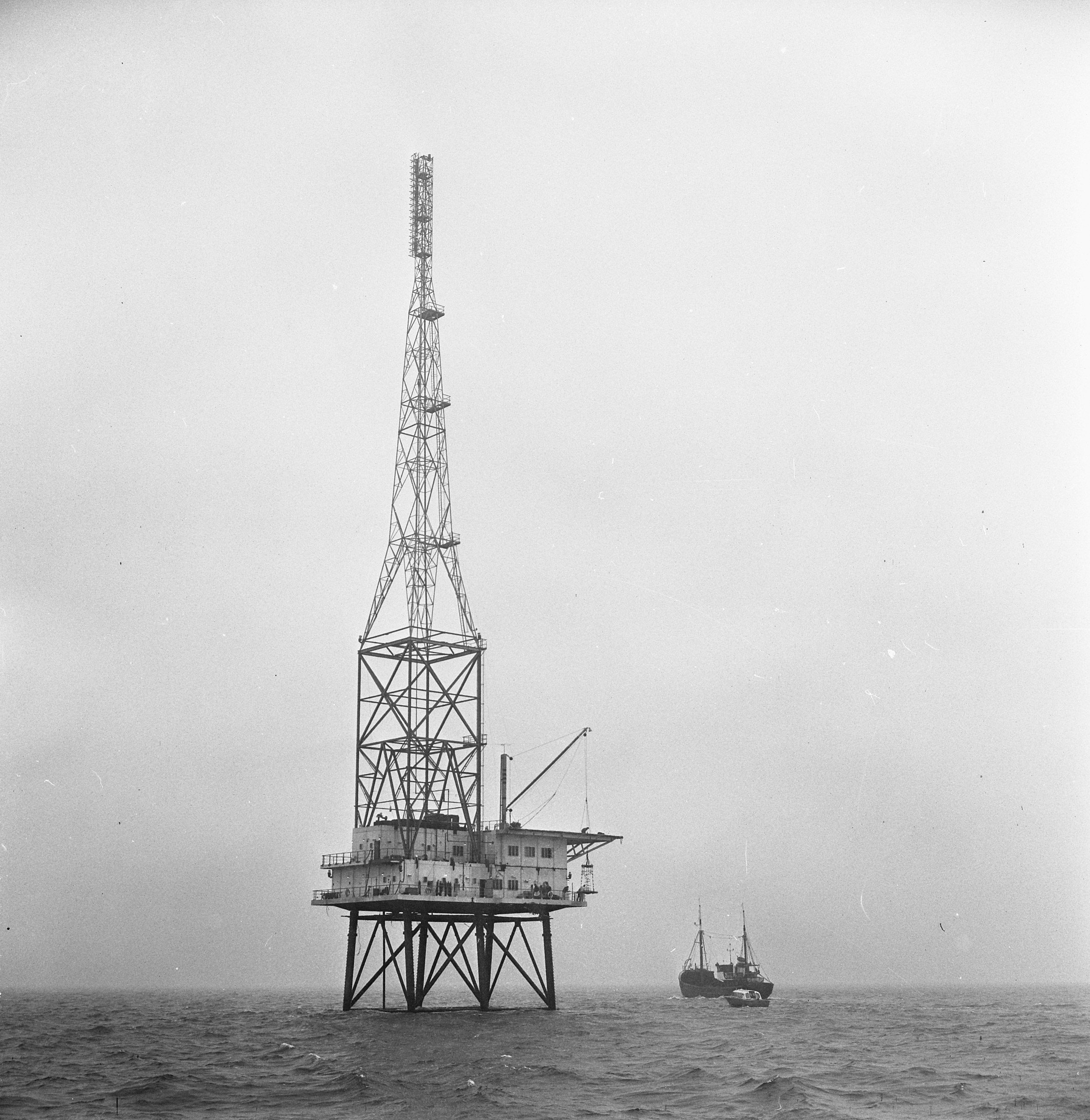 Collectie / Archief : Fotocollectie Anefo Reportage / Serie : [ onbekend ] Beschrijving : Het REM-eiland Datum : 16 december 1964 Instellingsnaam : REM-eiland Fotograaf : Koch, Eric / Anefo Auteursrechthebbende : Nationaal Archief Materiaalsoort : Negatief (zwart/wit) Nummer archiefinventaris : bekijk toegang 2.24.01.03 Bestanddeelnummer : 917-2504